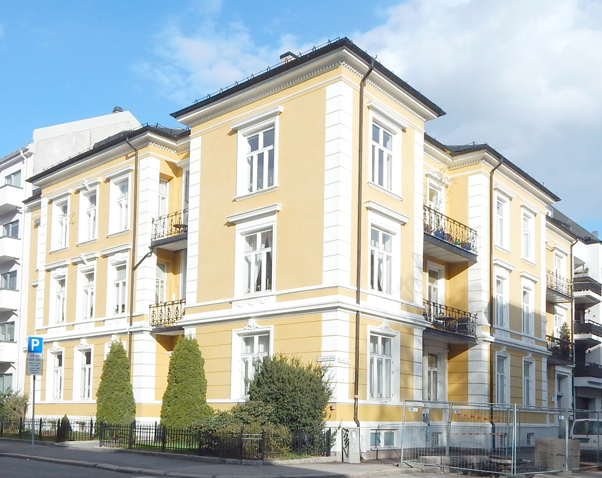 Sorgenfrigata 19.. Arkitekt: Matheus Mosgaard (1895–96).